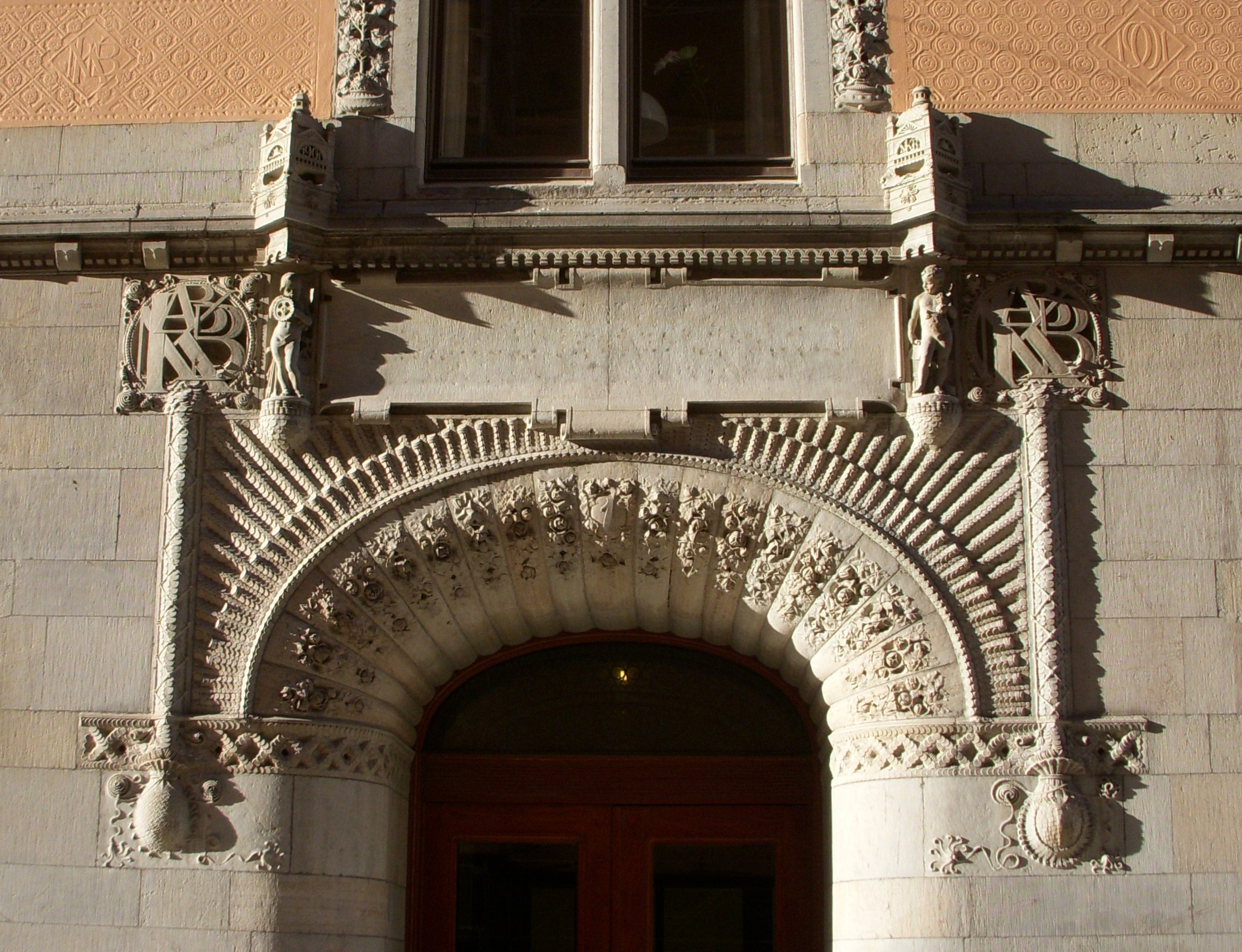 "Rosenbad", Regierungskanzlei in Stockholm, Architekt Ferdinand Boberg, Detail